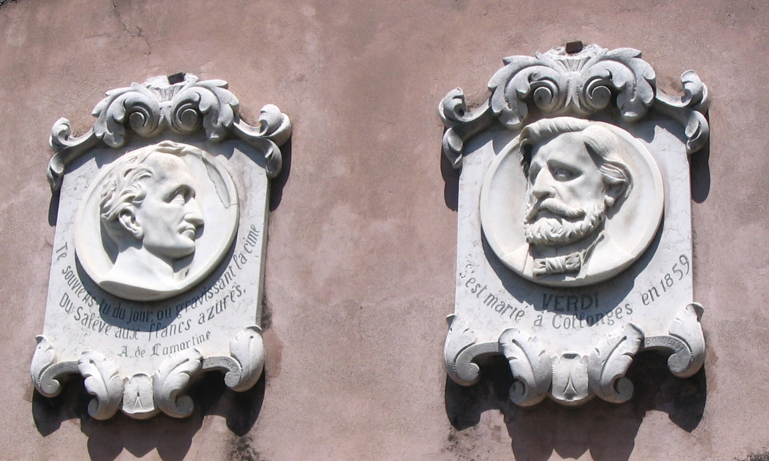 Plaque commémorative à Collonges-sous-Salève, du mariage de Giuseppe Verdi avec la cantatrice Giuseppina Strepponi , le 29 Août 1859 et plaque commémorative du séjour de Alphonse de Lamartine